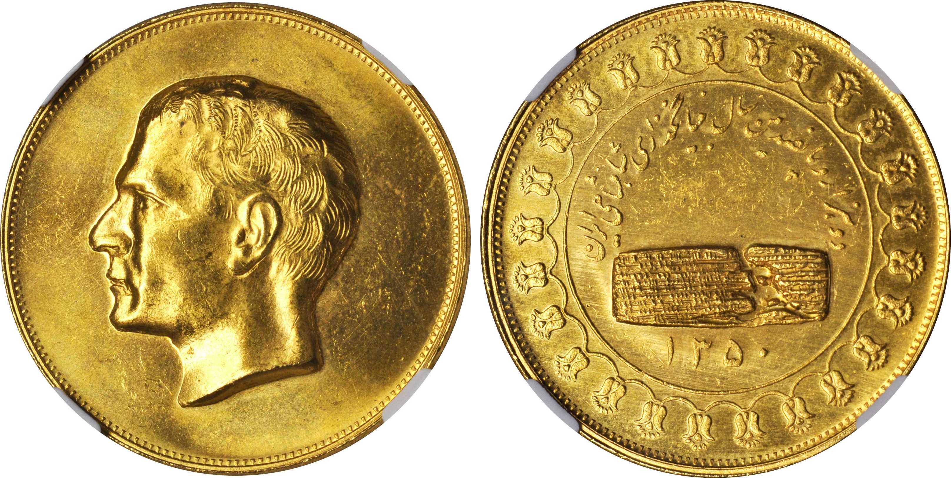 مدال یادبود طلا ۴۰ گرمی بمناسبت جشنهای ۲۵۰۰ ساله